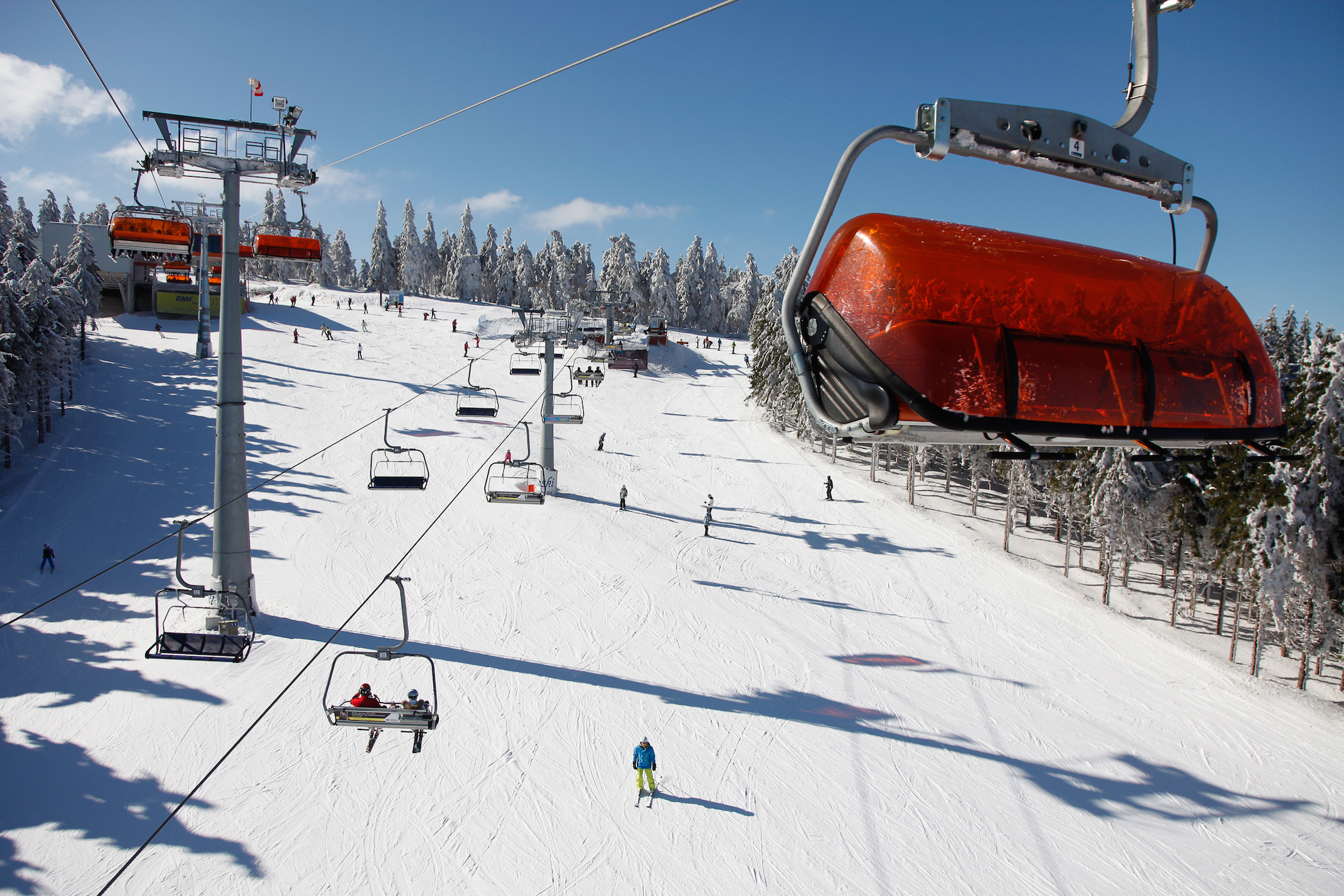 Zieleniec Ski Arena w pełni sezonu